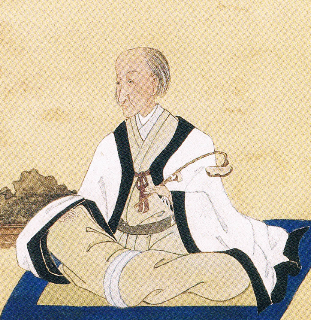 春木南湖筆 雪斎公肖像画（部分）文化14年 個人蔵